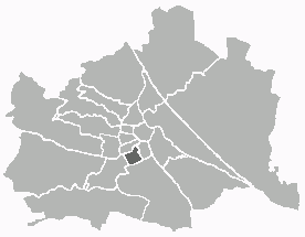 Positionskarte des 5. Wiener Gemeindebezirks Unter Verwendung einer Vorlage von Extrawurst. Public Domain.